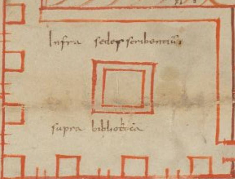 Recorte da planta da Abadia de São Gallo, na Suíça.